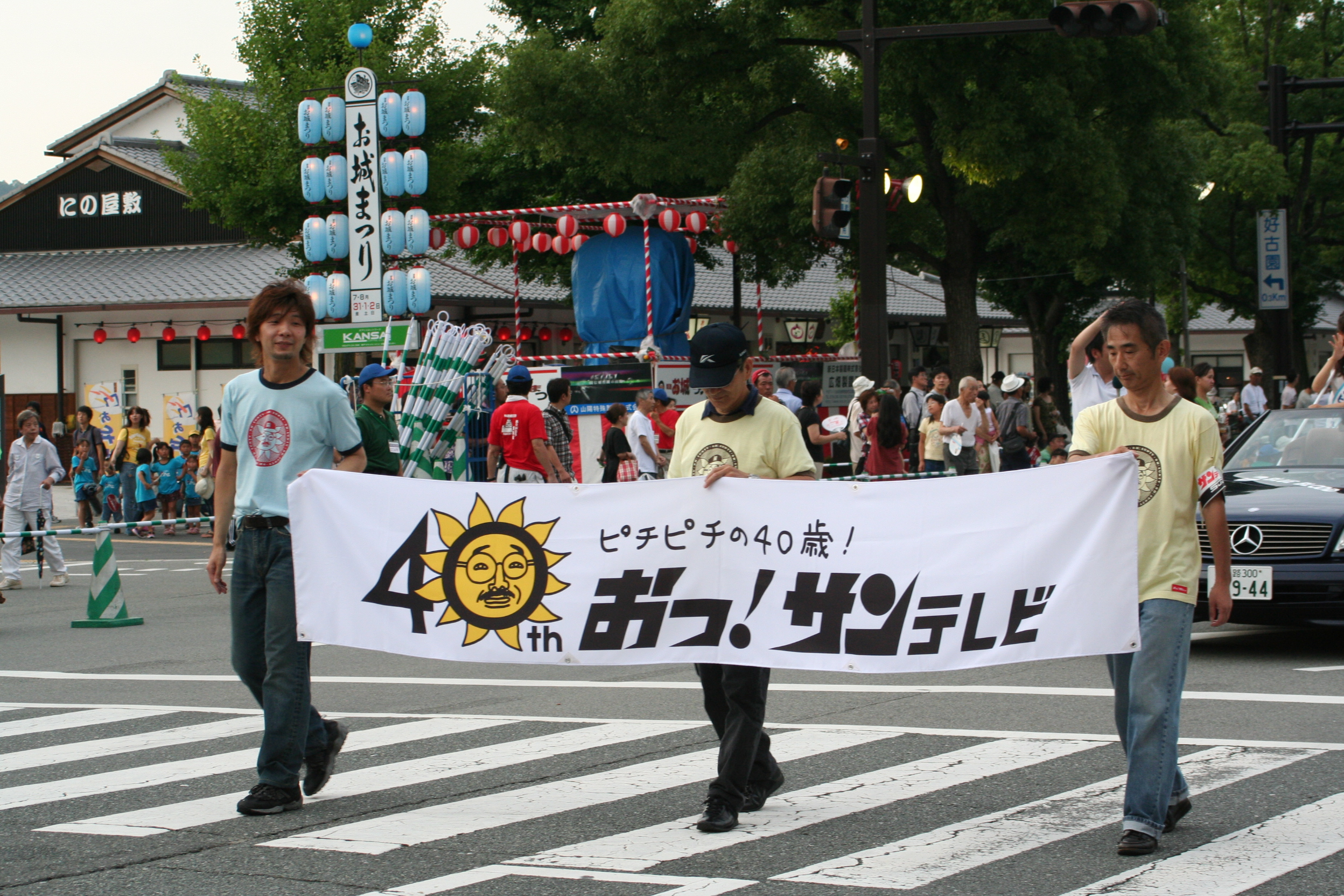 姫路お城祭。兵庫県姫路市にて毎年7月末から8月2日の3日間に渡り姫路城の南部大手前通りにて開催される祭である。第60回開催の2日目の祭の様子。 サンテレビによるパレード。